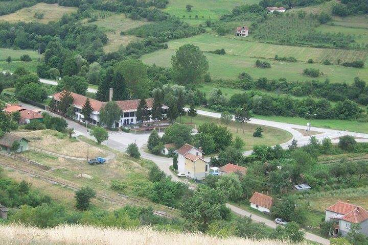 Црква у Рудару, Куршумлија